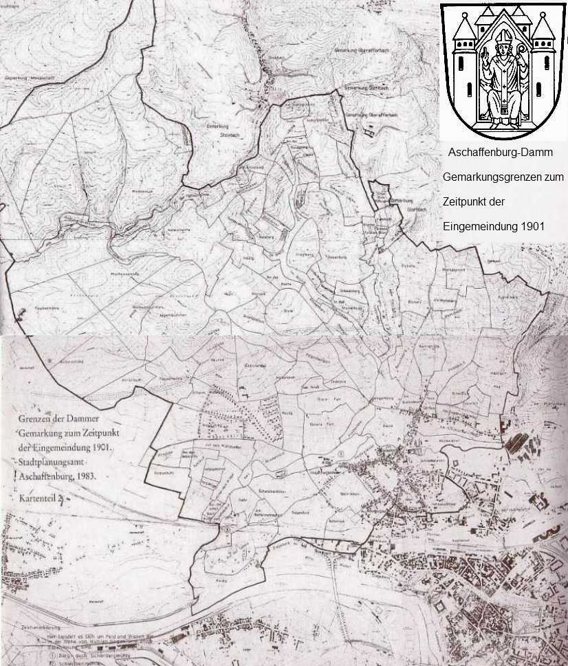 Aschaffenburg Gemarkung Damm in den durch Baulandumlegungen veränderten Grenzen von 1901 (Eingemeindung) und zusätzlich das von Mainaschaff 1961 eingemeindete Gebiet zwischen dem Hasenhägweg und der Aschaff